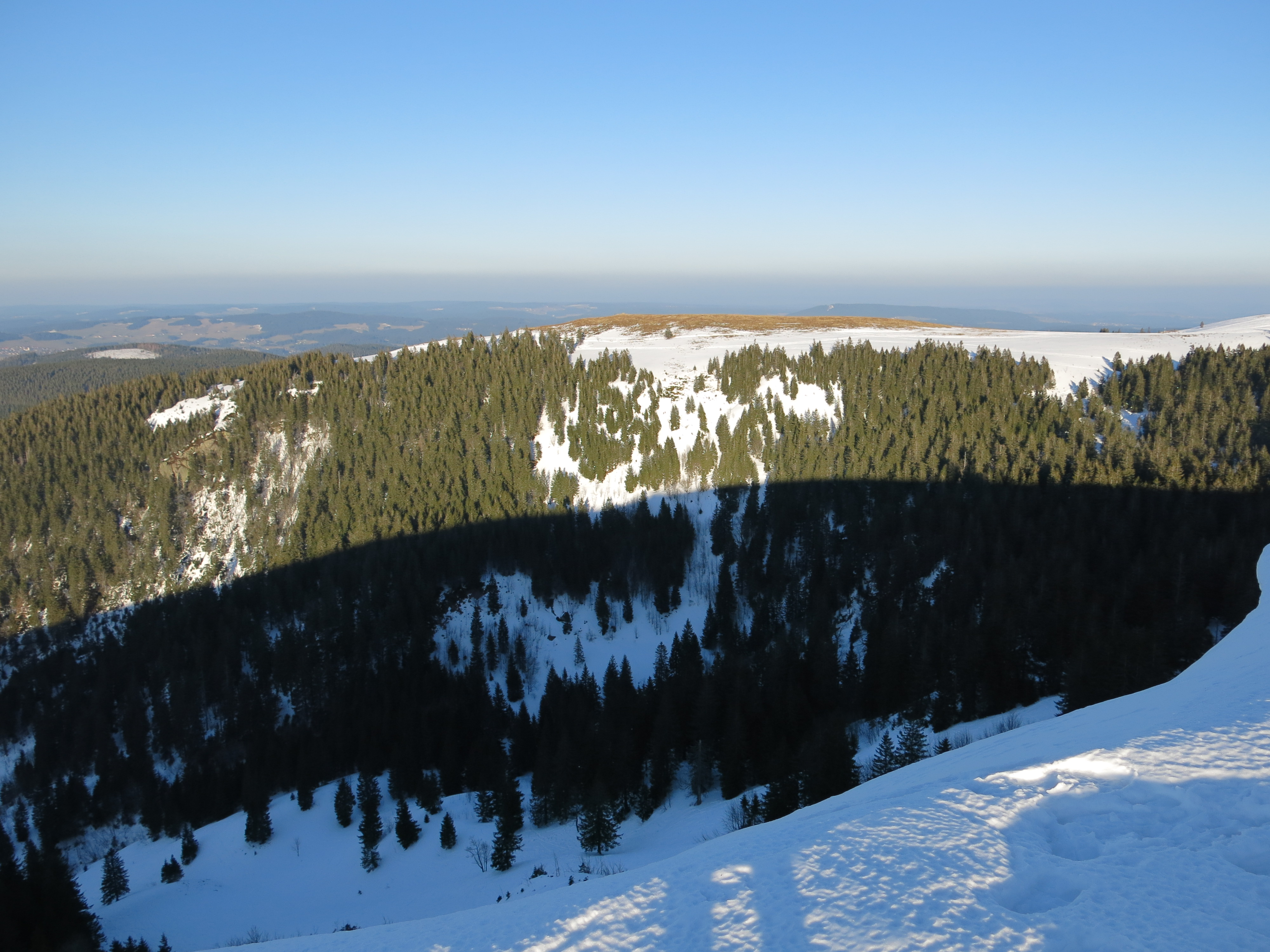 Blick von Südwesten über das Zastler Loch auf den Baldenweger Buck